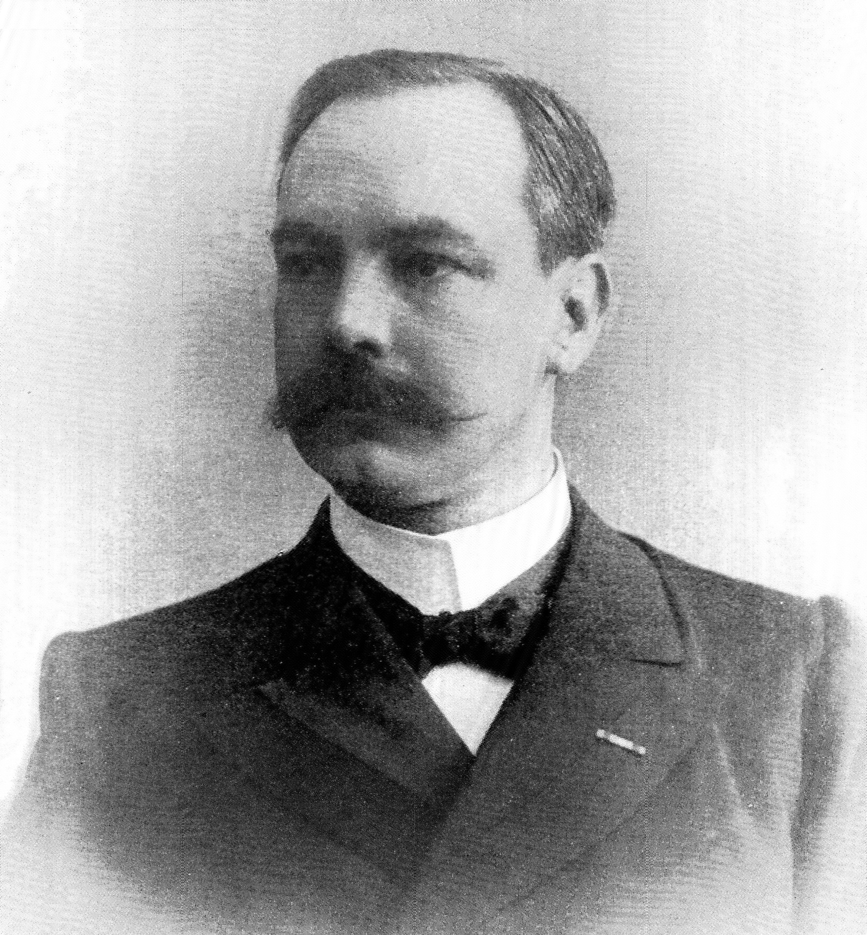 A.W.F. Idenburg